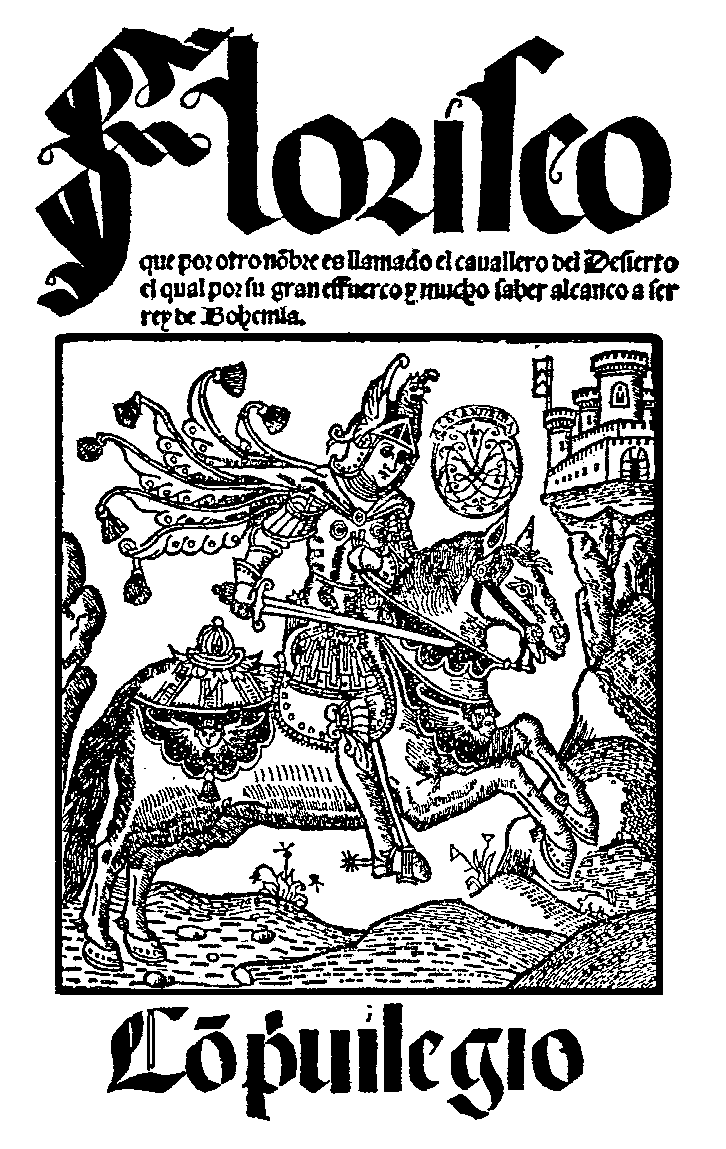 Floriseo